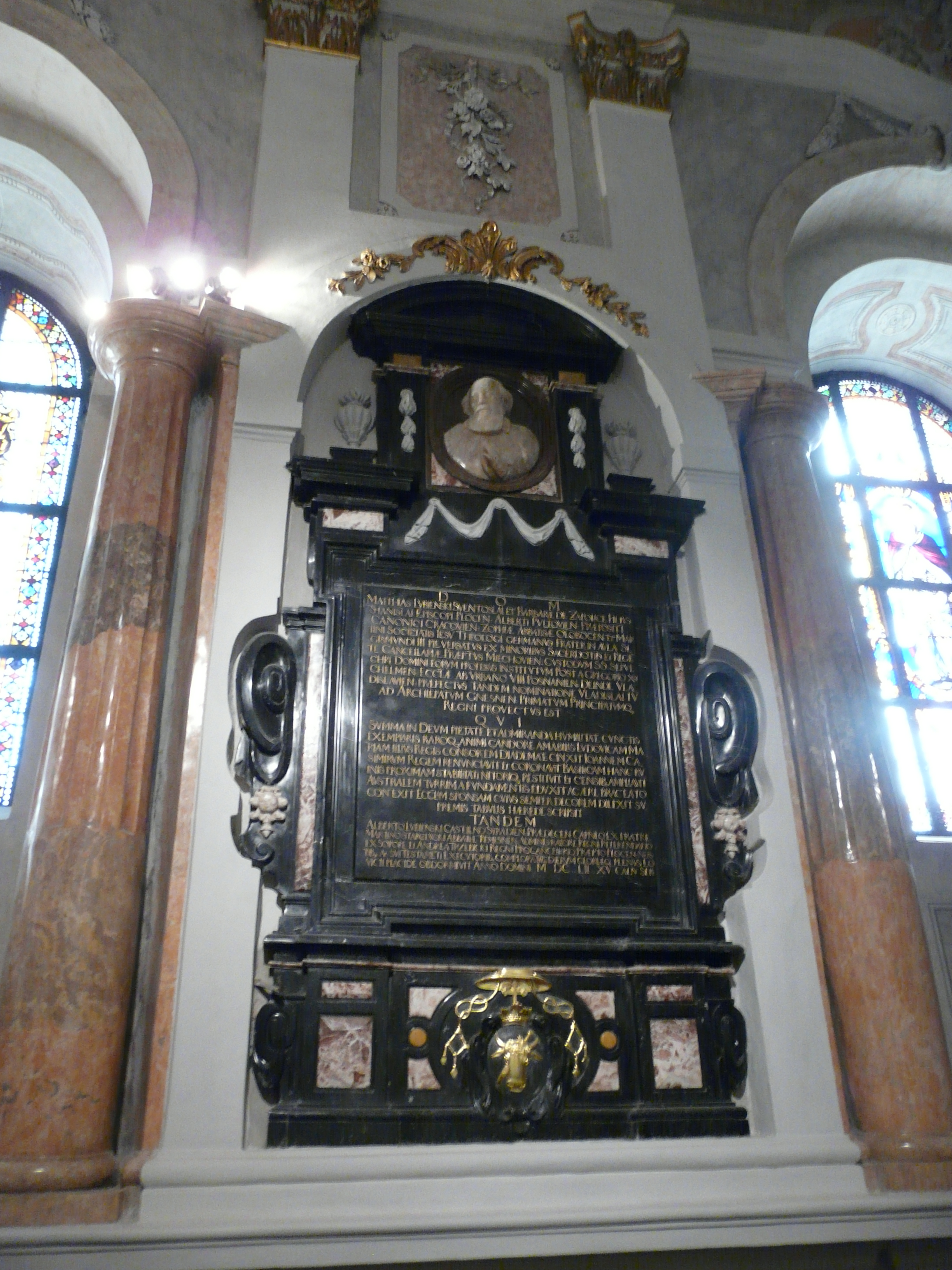 Gniezno, Poland